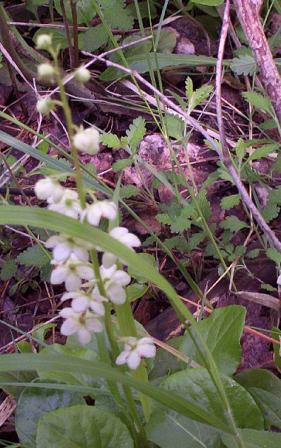 Körtike (Pyrola) a Vértesben